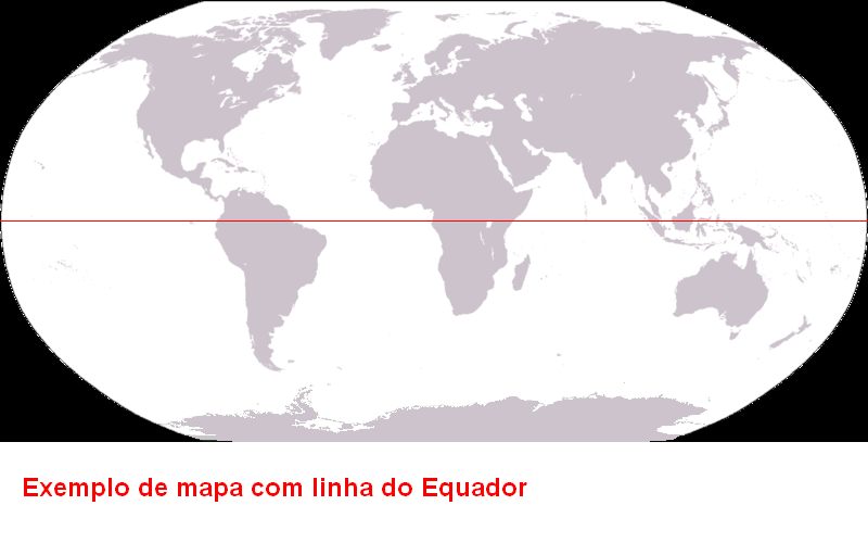 mapa mundi